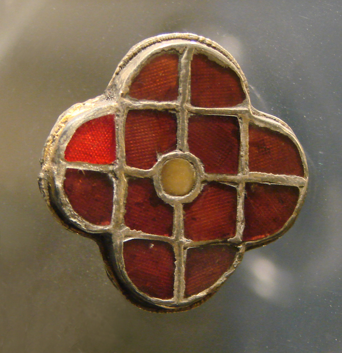 Fibule polylobée, argent doré, ivoire et verre rouge, époque mérovingienne, 6ème s. + JC. Trouvée à Charleville-Mézières, mobilier d'une tombe féminine.Musée de l'Ardenne, Charleville-Mézières (08), France.